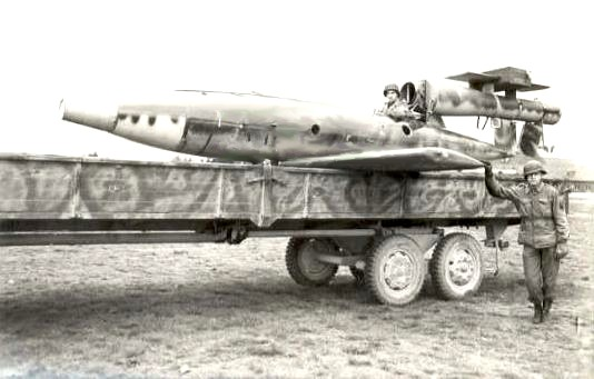 Am 23. April 1945 eroberte die 5. Armoured Division der US-Armee die Luftmuna Neu Tramm bei Dannenberg an der Elbe. Dabei fiel den Ameri­kanern eine größere Anzahl von ein- und zweisitzigen „Reichenberg“-Flugkörpern in die Hände. Dabei handelte es sich um bemannte Versionen der Fieseier Fi-103, die für den Selbstopfereinsatz vorgesehen waren.